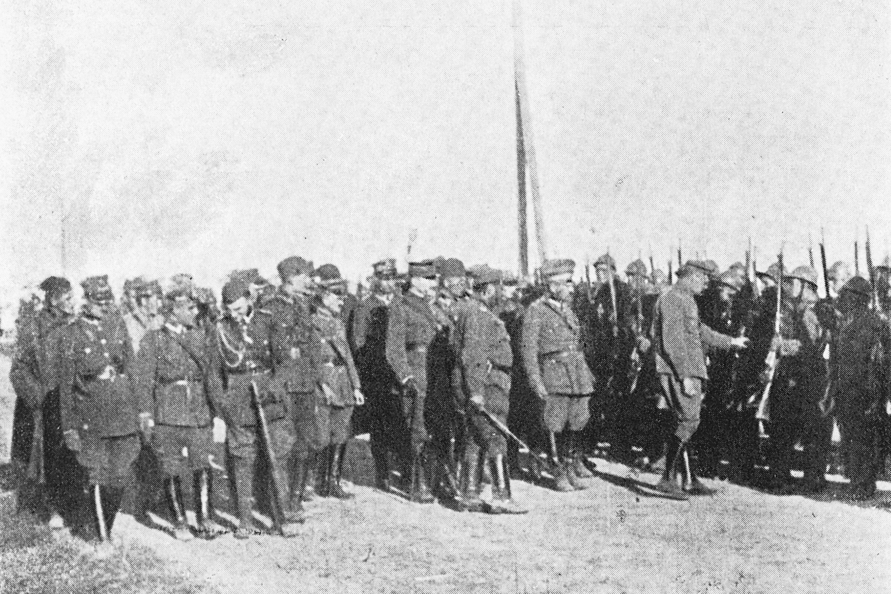 Naczelny Wódz Marszałek Józef Piłsudski, z d-cą 2-ej armii gen. Śmigłym-Rydzem, dokonuje przeglądu Wileńskiego Pułku Strzelców na polach pod Lidą; 29 września 1920